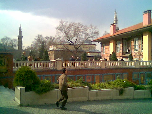 Orhangazi Parkı